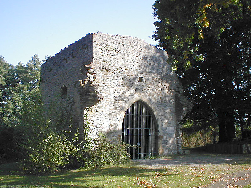 Reste des Turms der gotischen Kirche der ehemaligen Siedlung Helmbund, aus der Neuenstadt am Kocher hervorgegangen ist. Bis ins 18. Jhd. Grablege verschiedener regionaler Adliger, darunter die Herren von Weinsberg. Baden-Württemberg, Germany